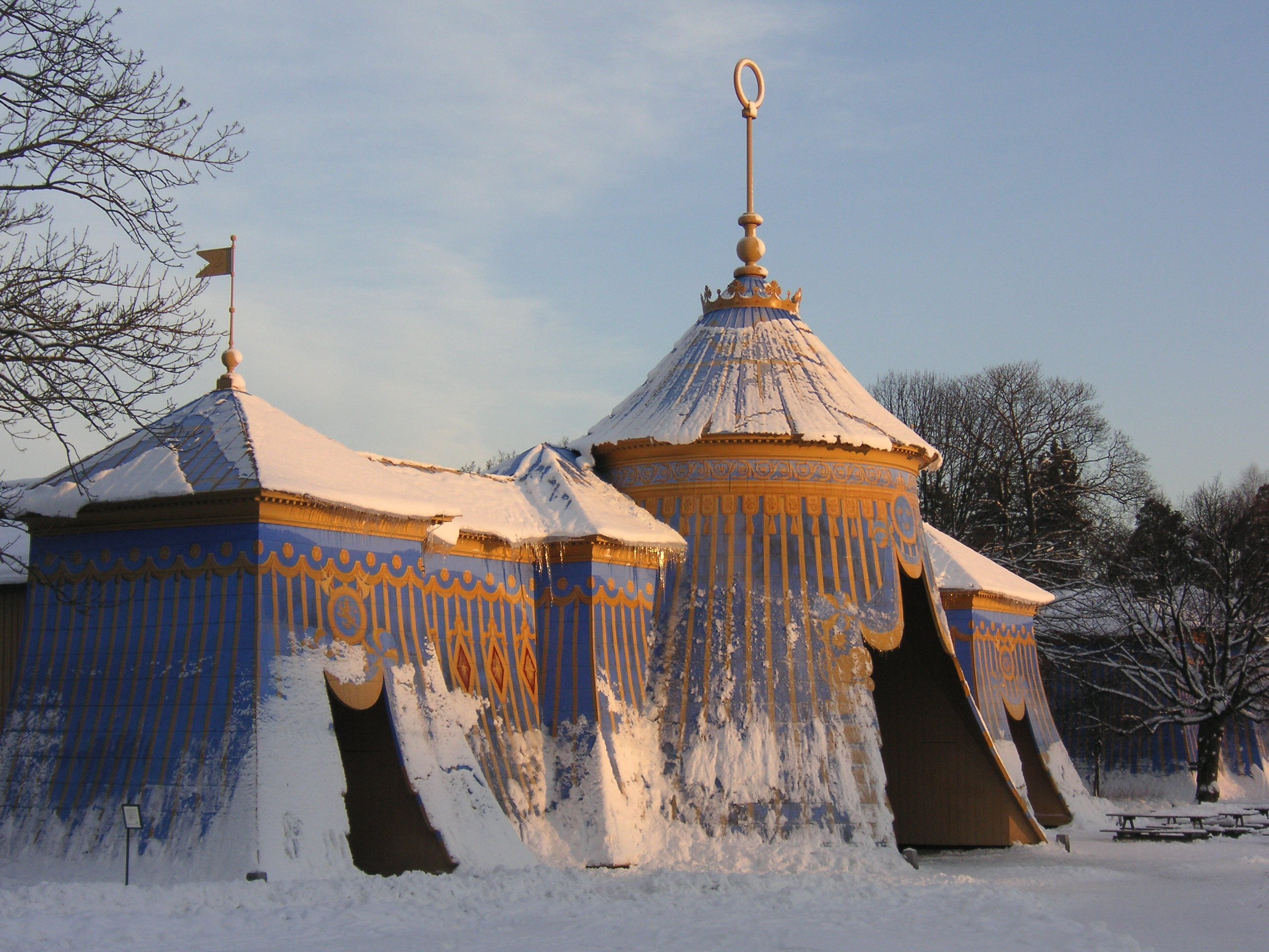 Kupferzelt im Hagapark(en) bei -16°C